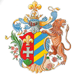 Le blason de la famille Hottinguer